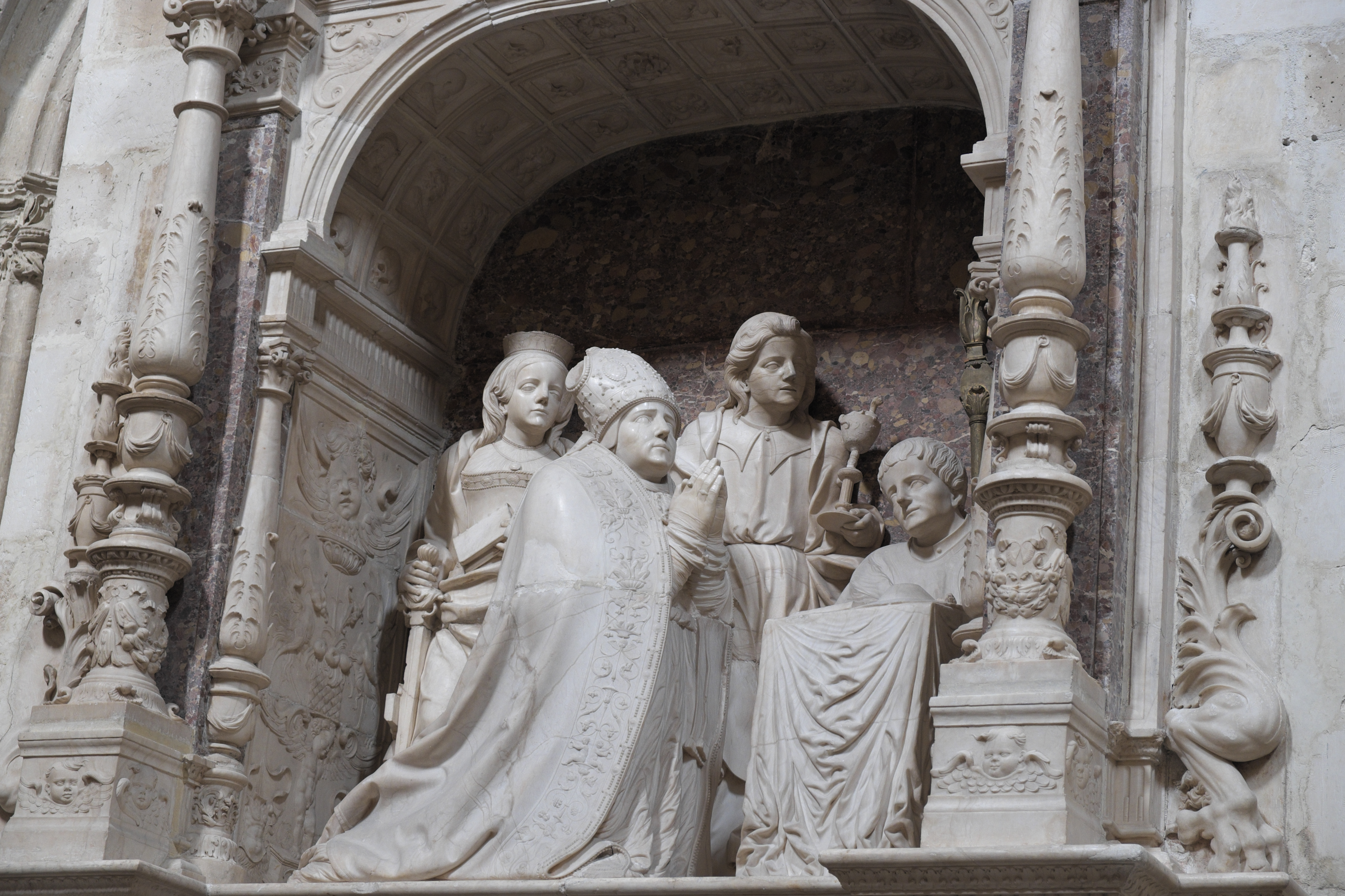 Kapelle des Colegio de San Gregorio, heute Museo Nacional de Escultura, in Valladolid (Kastilien und León/Spanien), Alabaster-Grabmal des Bischofs Diego de Avellaneda, aus dem Kloster San Juan Evangelista y Santa Catalina in Espeja de San Marcelino, von Felipe Bigarny und Enrique de Maestrique, fertiggestellt von Juan de Gómez, zwischen 1536 und 1566 geschaffen